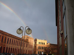 Ciudad Tecnológica Valnalón